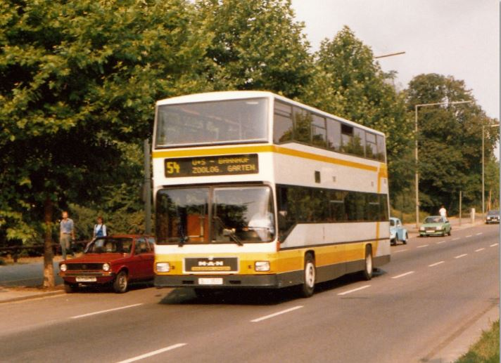 Prototyp MAN SD202 D80